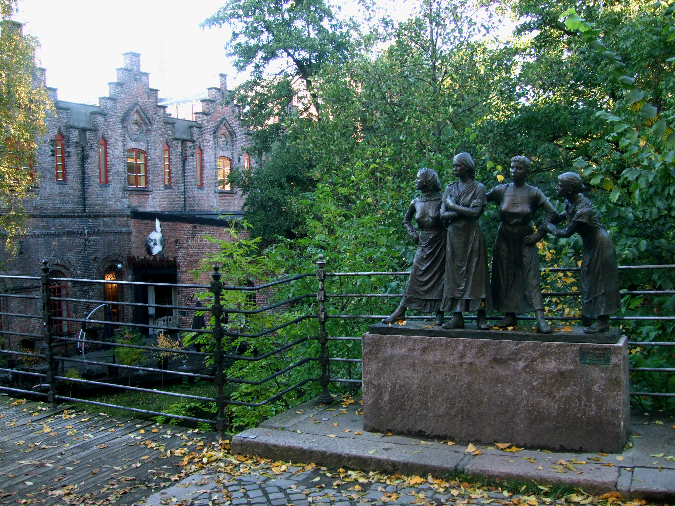 Skultpturen Fabrikkjentene ved Akerselva i Oslo.